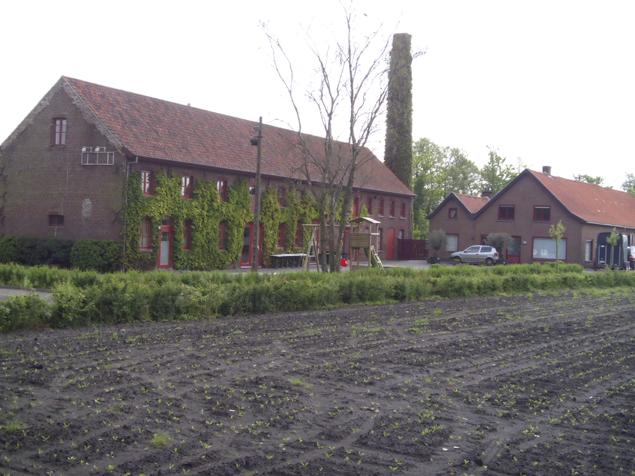 Watermolen van Wanzeele of Zingende Watermolen, Watermolenstraat 2, Ruddervoorde (Oostkamp), nabij het Vrijgeweid.